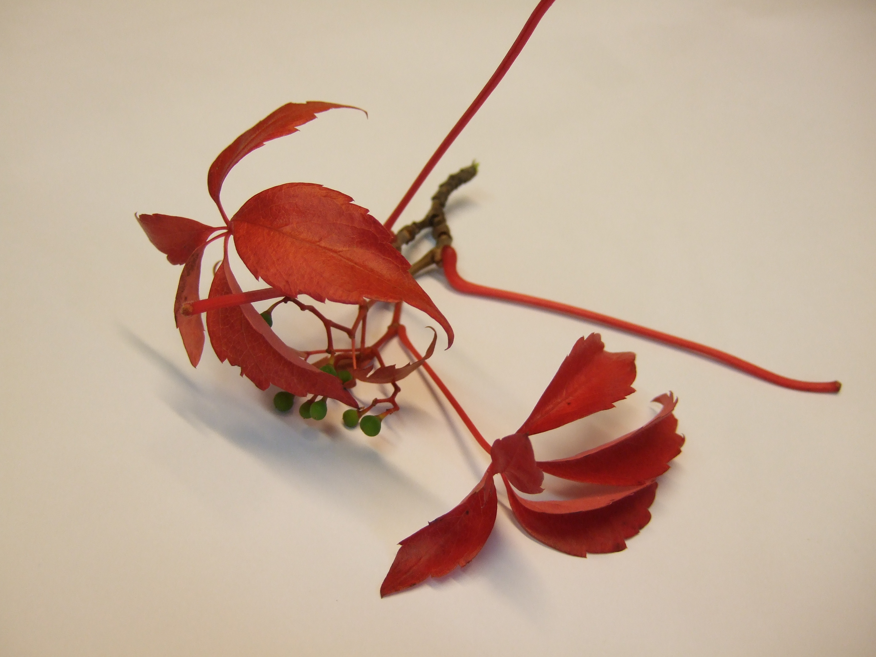 Parthenocissus quinquefolia, autumn colours.